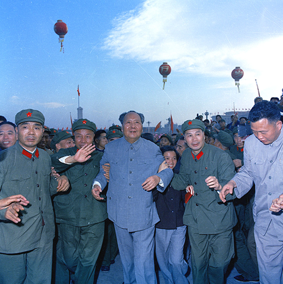 1966年10月1日，毛泽东走下天安门城楼，到广场接见红卫兵。左为萧华，右为杨成武。